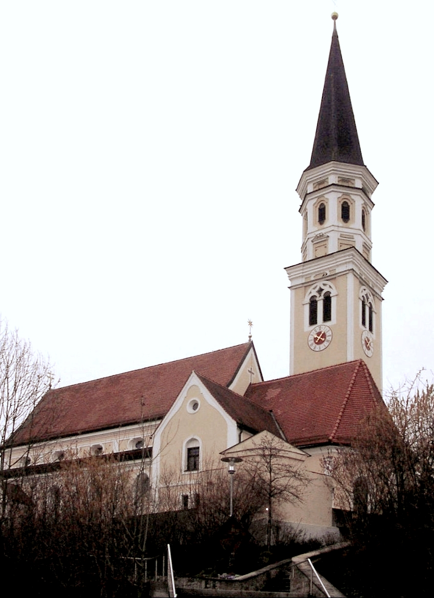 Pfarrkirche St. Benedikt in Odelzhausen (vom Markt aus gesehen).